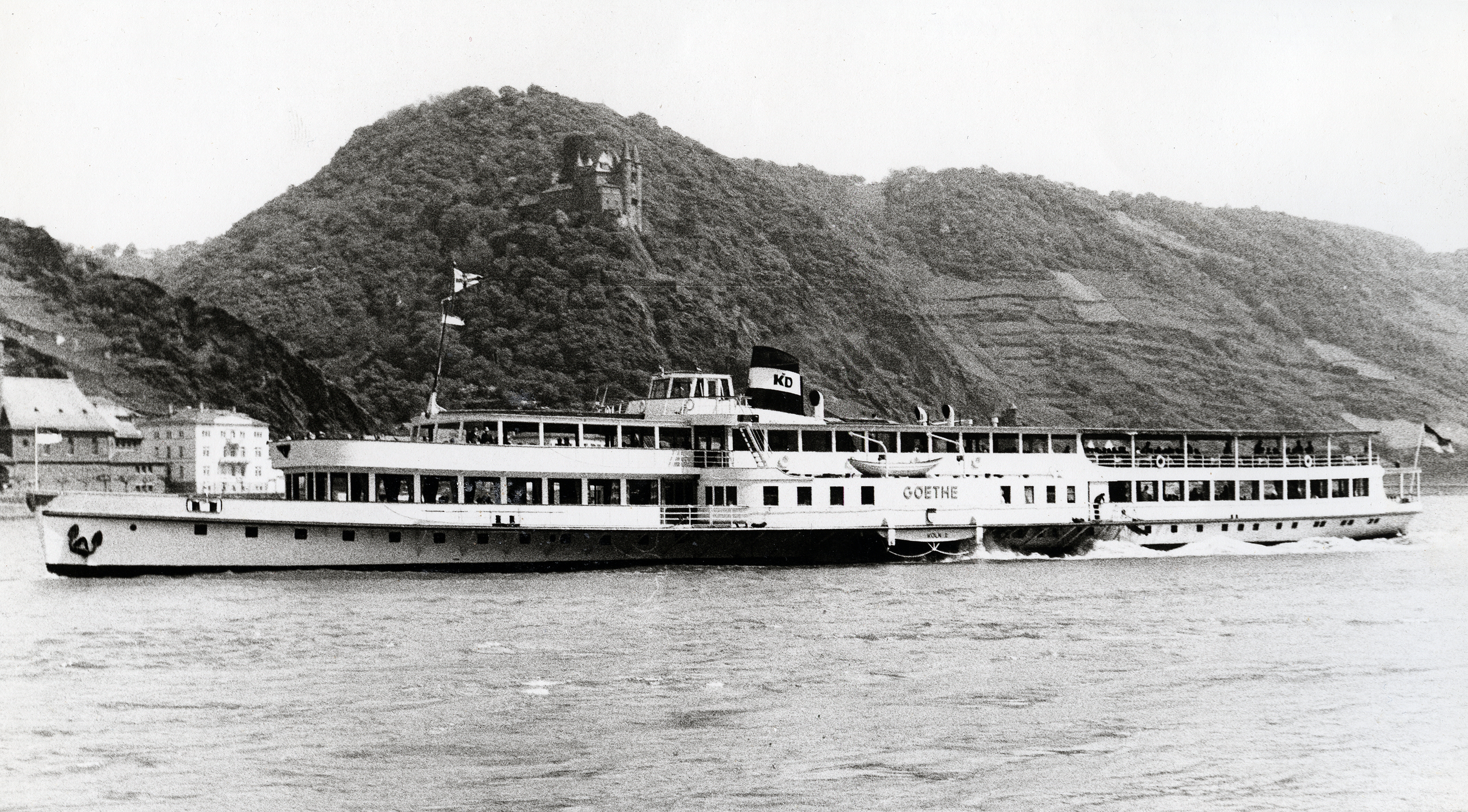 Der Raddampfer Goethe im Mai 1973 bei Sankt Goar.